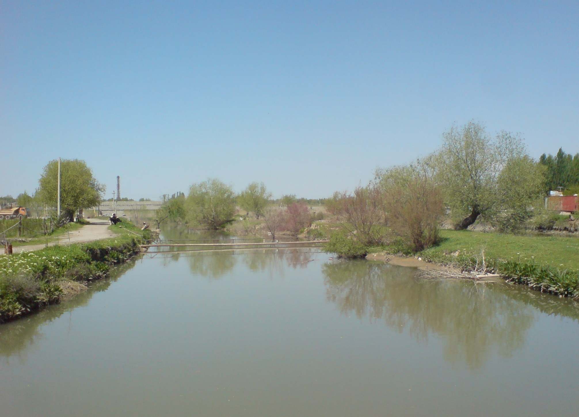 Канал Каракамыш в низовьях, перед впадением в Нижний Бозсу